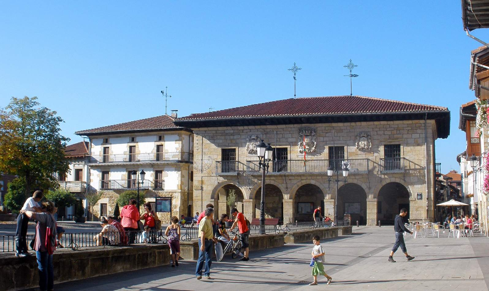 Casa Consistorial de Ochandiano, Vizcaya